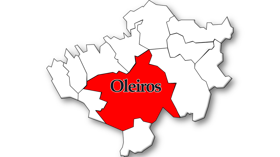 População